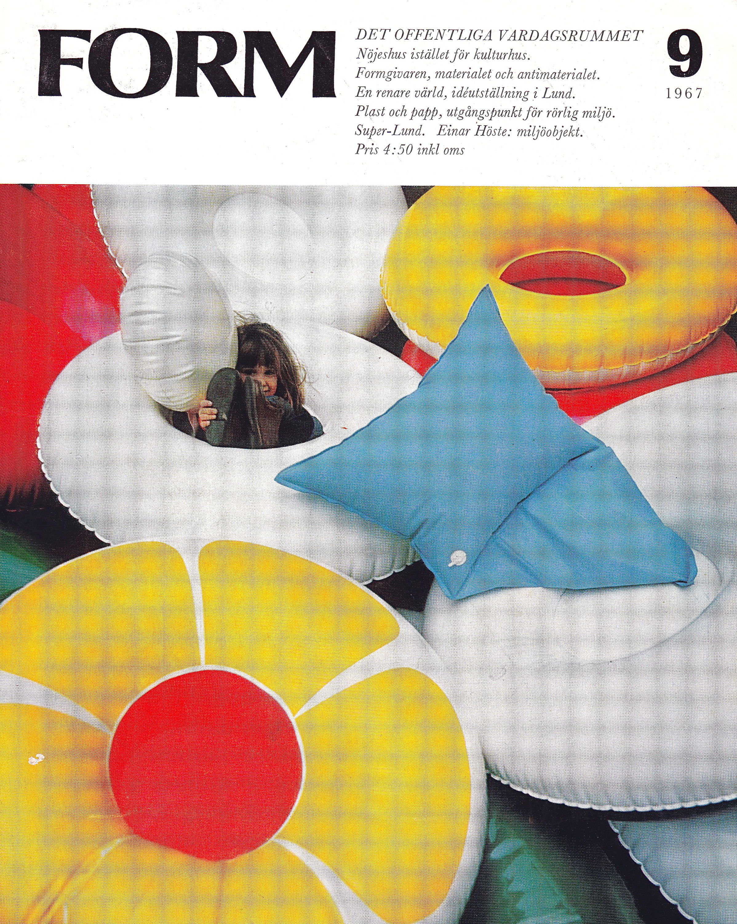 Omslag för tidskriften FORM med Stephan Gips plastmöbler "Blow-up"